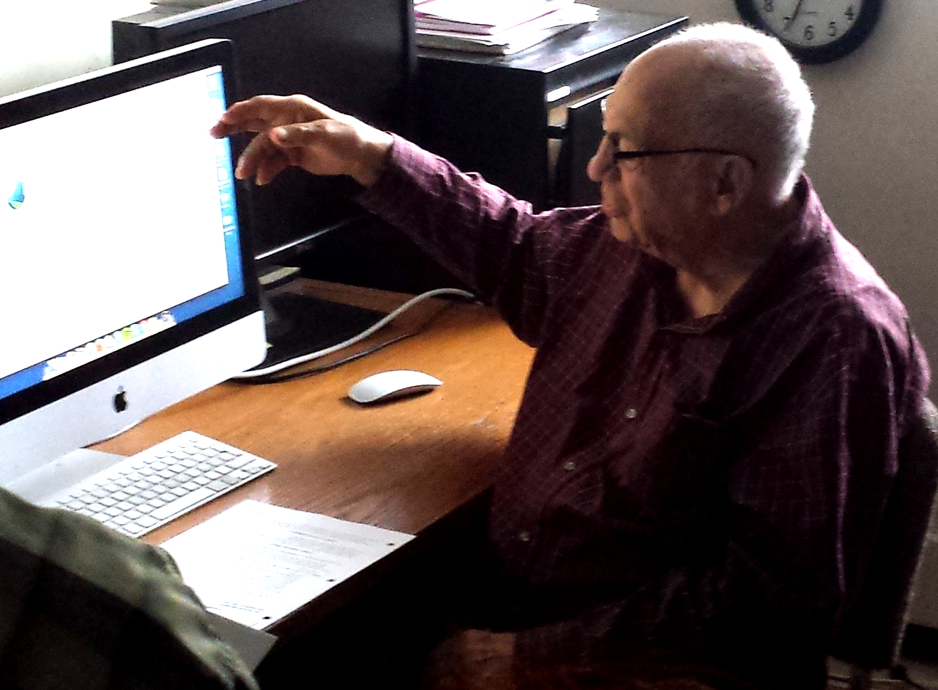 Michel Cartier lors d'un séminaire sur la schématisation (mai 2017).